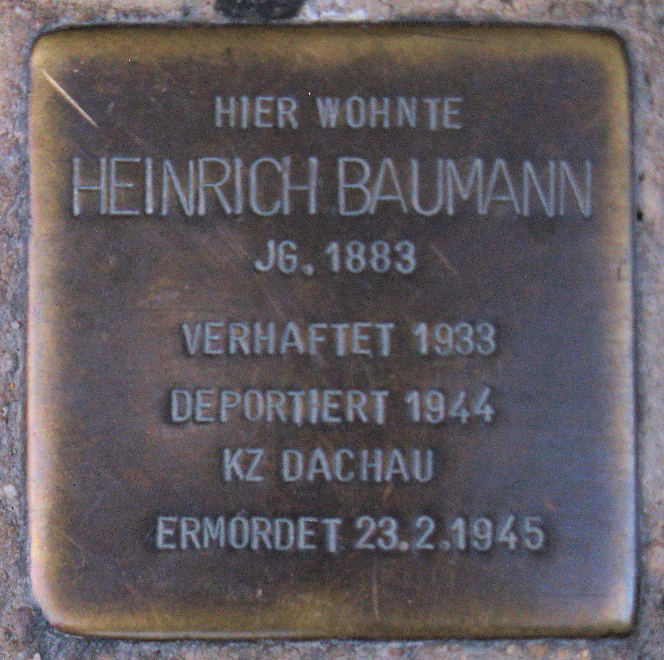 Stolperstein Stuttgart, Heinrich-Baumann-Straße 25, Heinrich Baumann Hier wohnteHeinrich BaumannJg. 1883Verhaftet 1933Deportiert 1944KZ DachauErmordet 23.2.1945